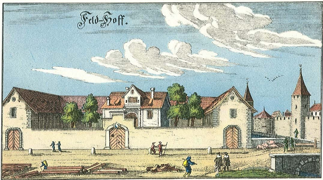 Paradeplatz: Der Feldhof 1760, Blick nach Norden. Heute steht dort die CS